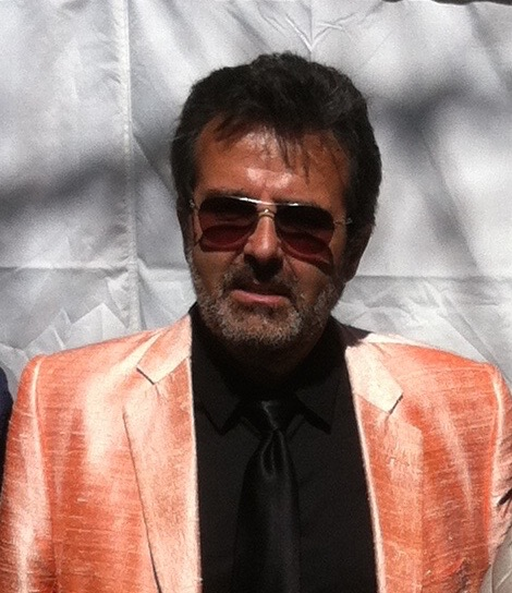 Xavier Sala i Martín Sant Jordi 2015